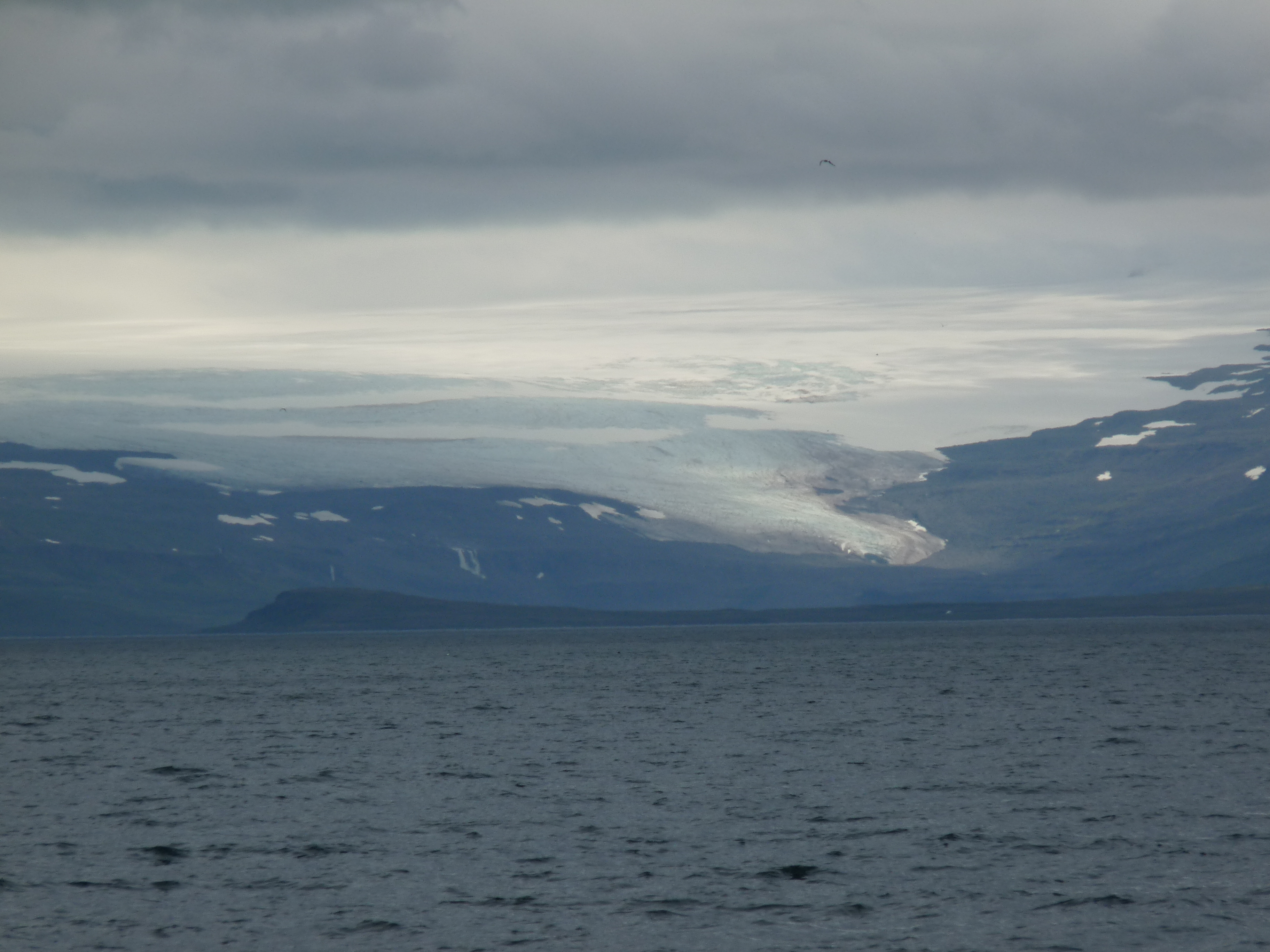 De Drangajökull gezien vanaf de Jökulfirðir fjord